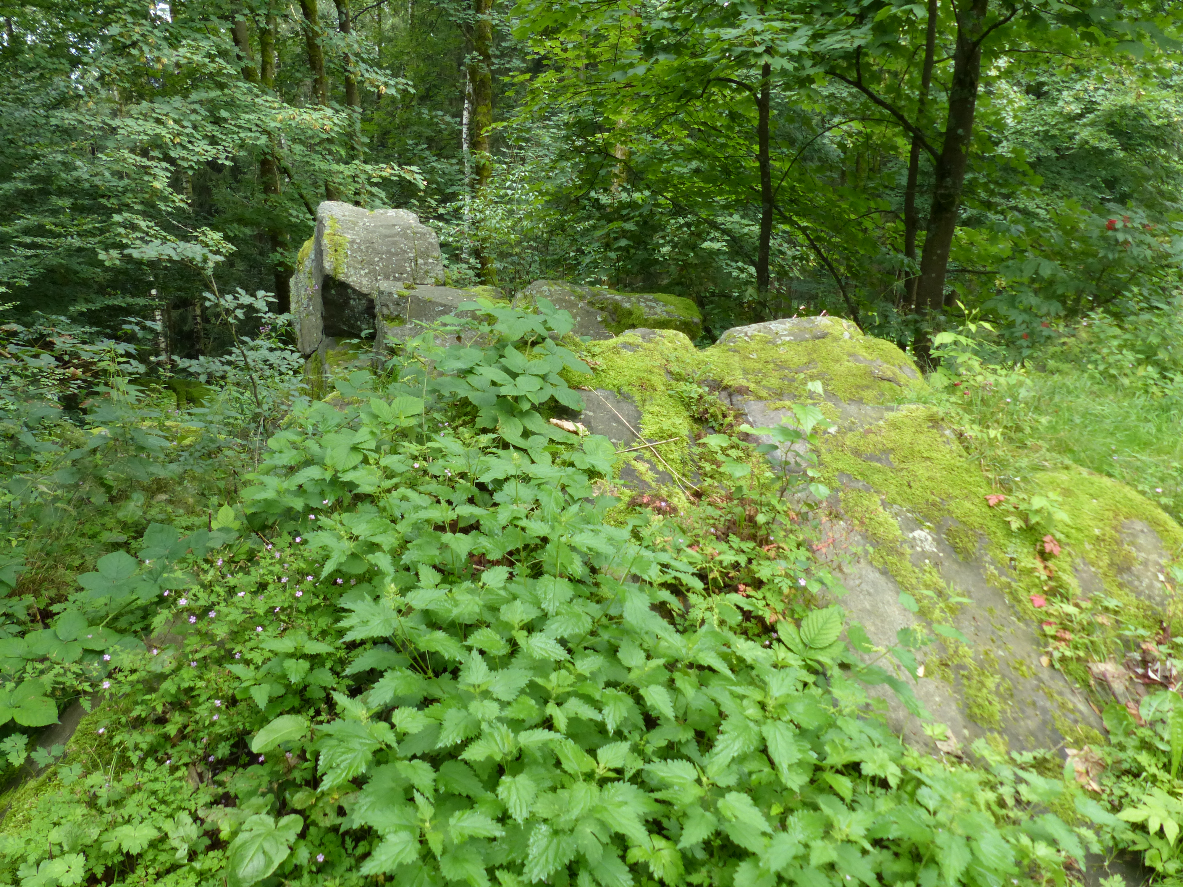 Serie Ansichten vom Weißenstein